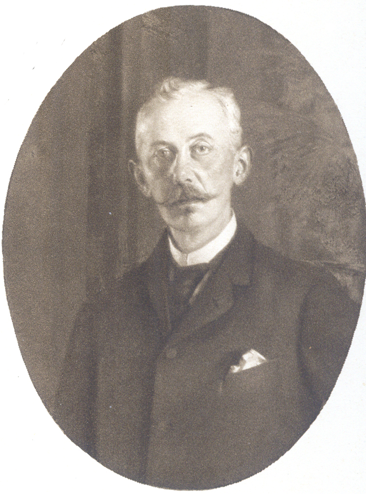 Paul von Andreae um 1912/14